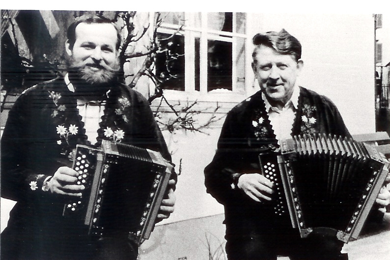 Alois Lüönd mit Martin Nauer. Foto entstand ca 1970. Mit Martin Nauer konnte Alois Lüönd in den 70er & 80er Jahren etliche Male auftreten und viele Stücke von Josef Stump und Balz Schmidig erlernen.